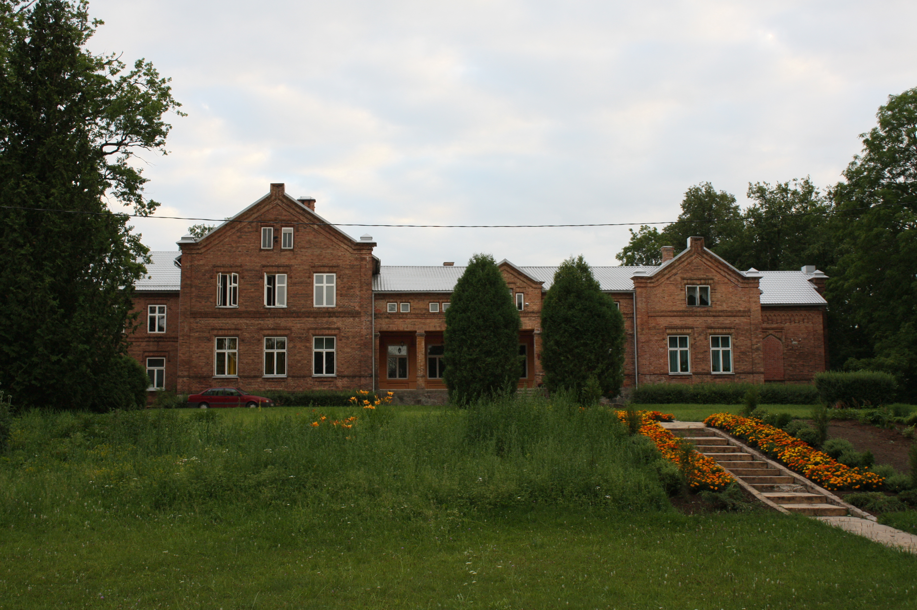 Endzele mõisa peahoone 2010. aastal